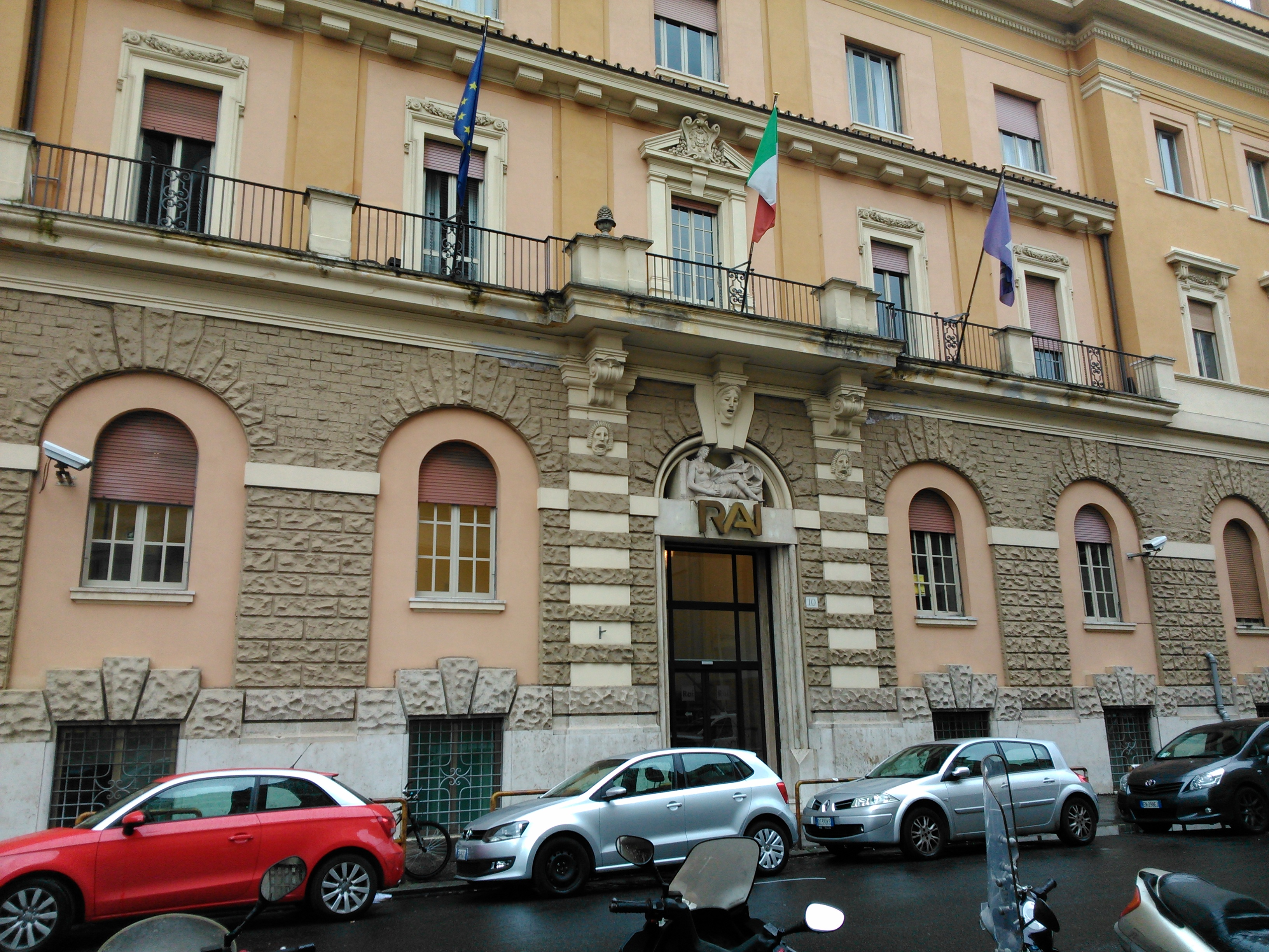 Studi Rai di Via Asiago 10